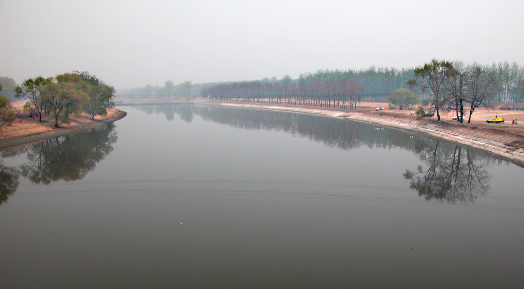 Elv ved Beijing Foto: Peter Morgan.A bend in the river